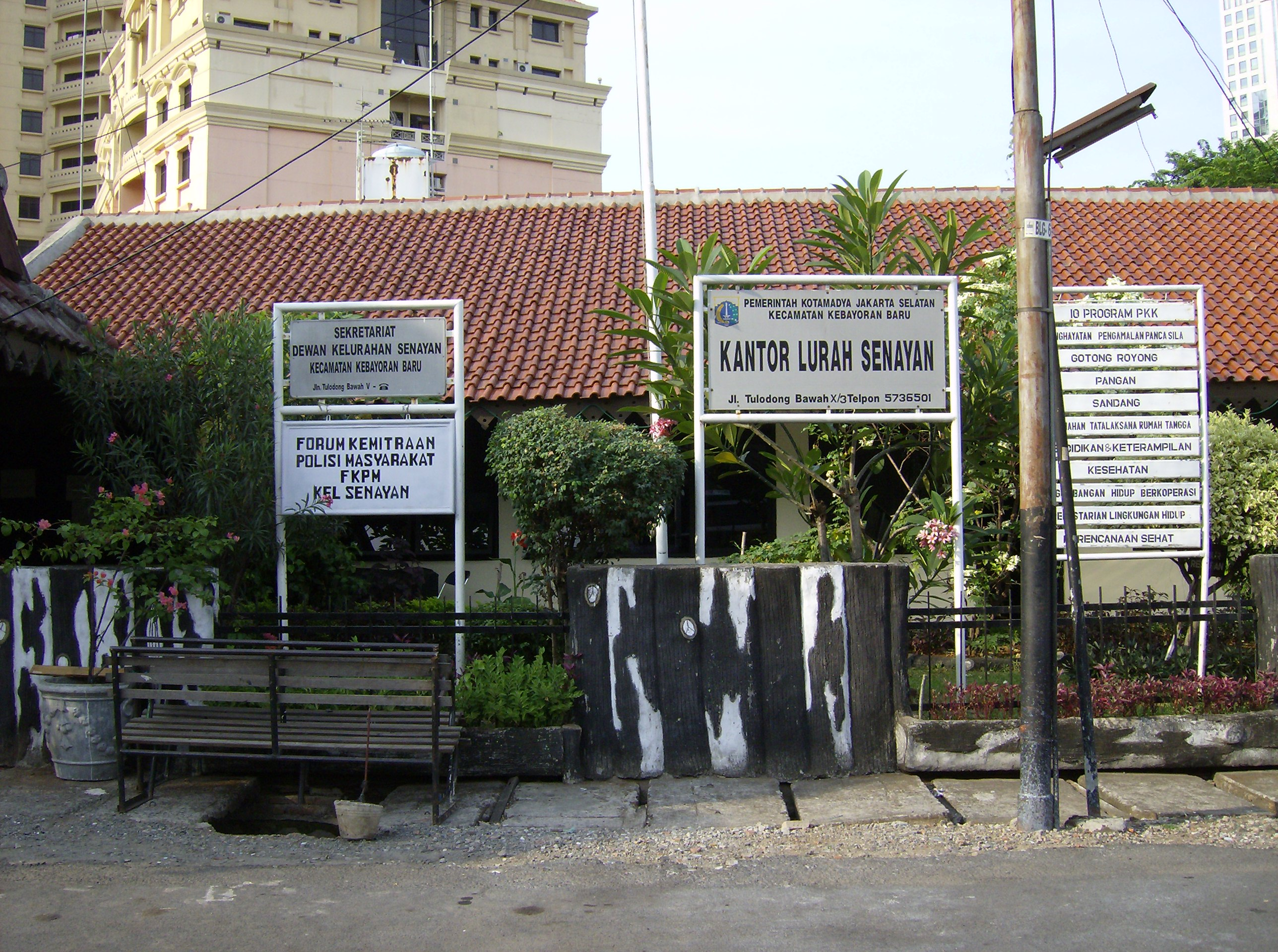 Made by Meursault2004 aka Revo Arka Giri Soekatno